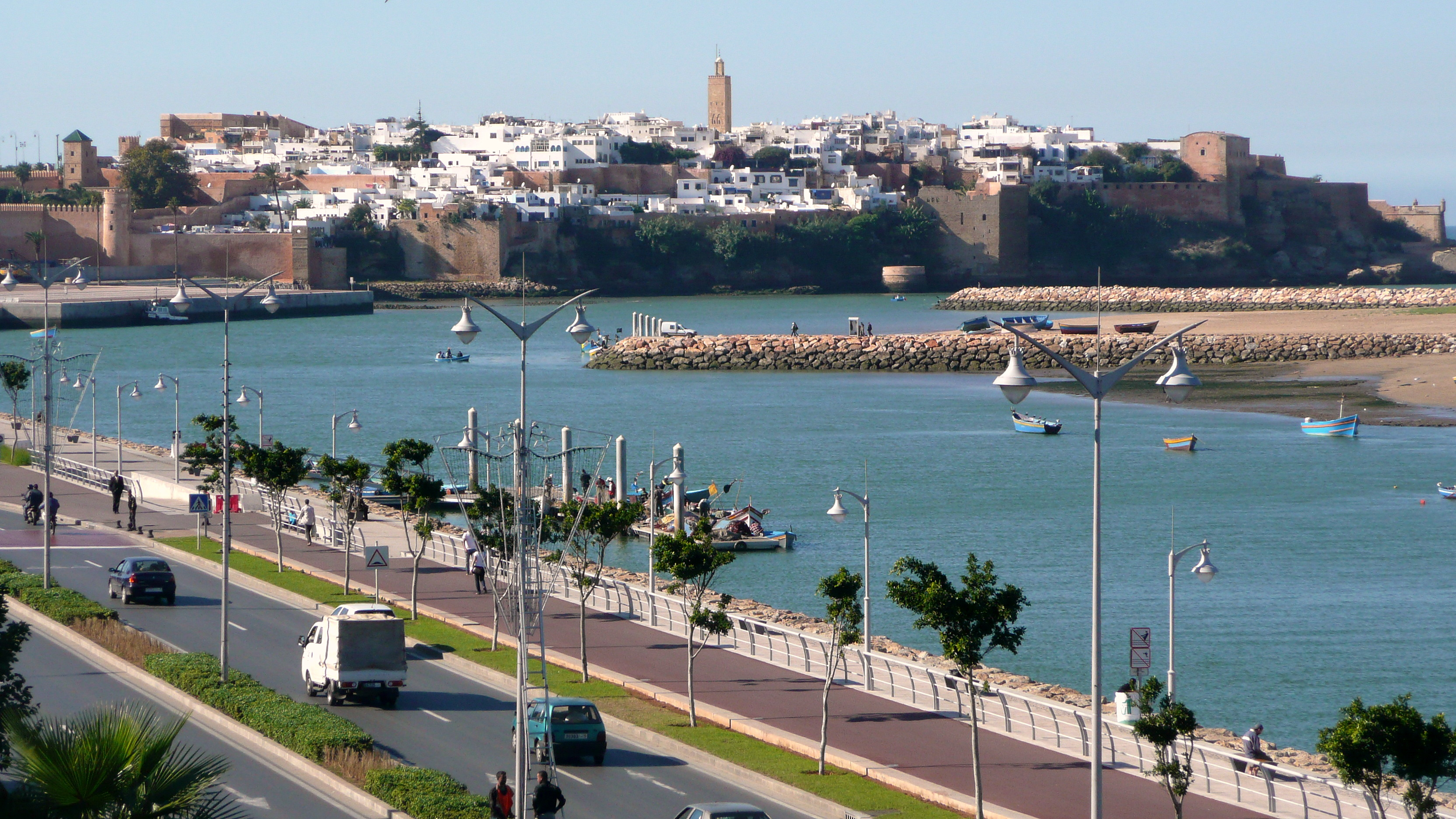 L'oued Bouregreg avec, au premier plan, les quais de Rabat (capitale du Maroc) alors en cours de rénovation, qui font partie de l'ensemble portuaire de Rabat-Salé et sont dédiés à l'accueil des plus grands bateaux, et en arrière plan, la kasbah des Oudayas, également située sur la rive de Rabat.